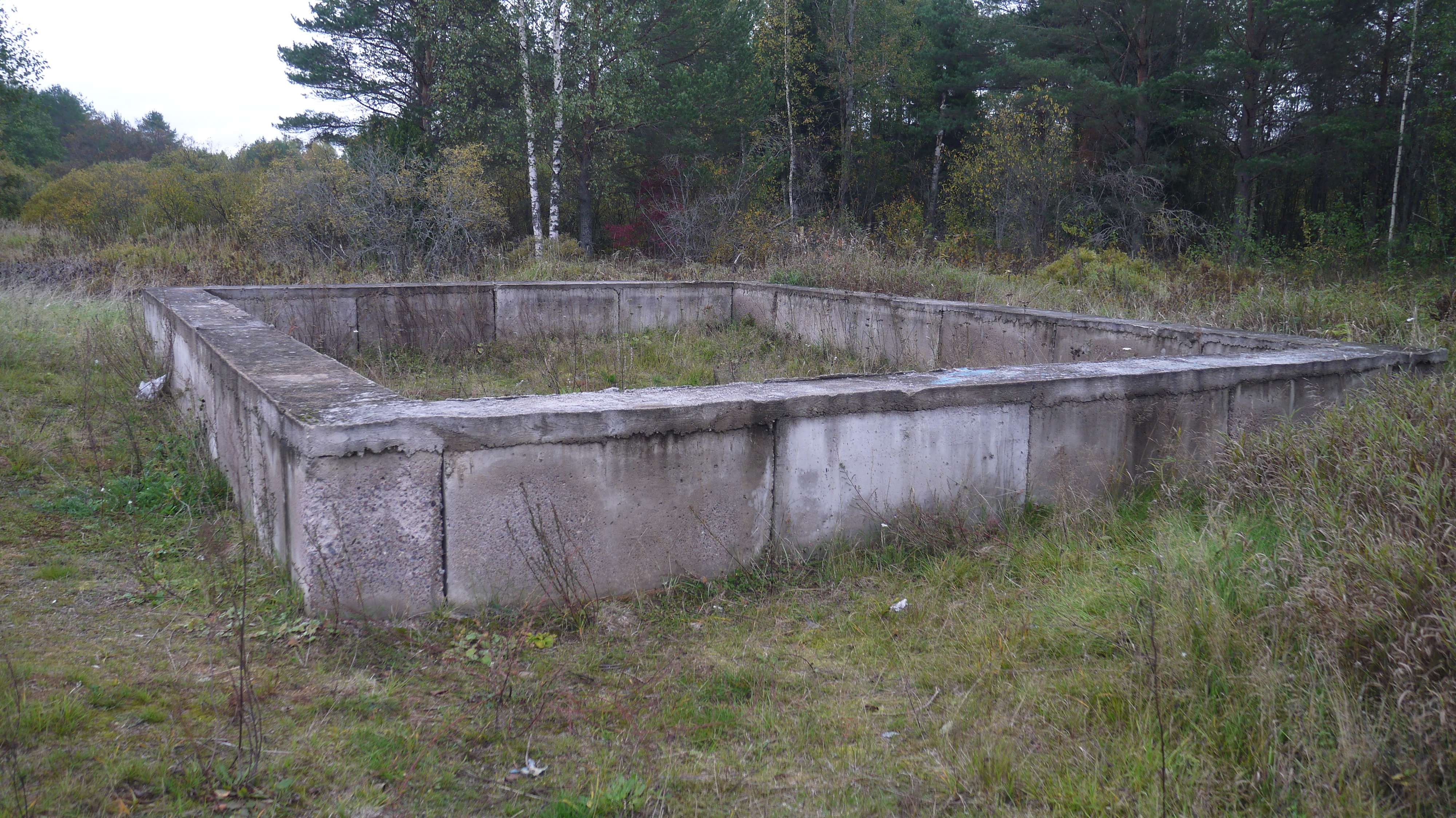 Малозаглубленный сборный ленточный фундамент из фундаментных бетонных блоков.